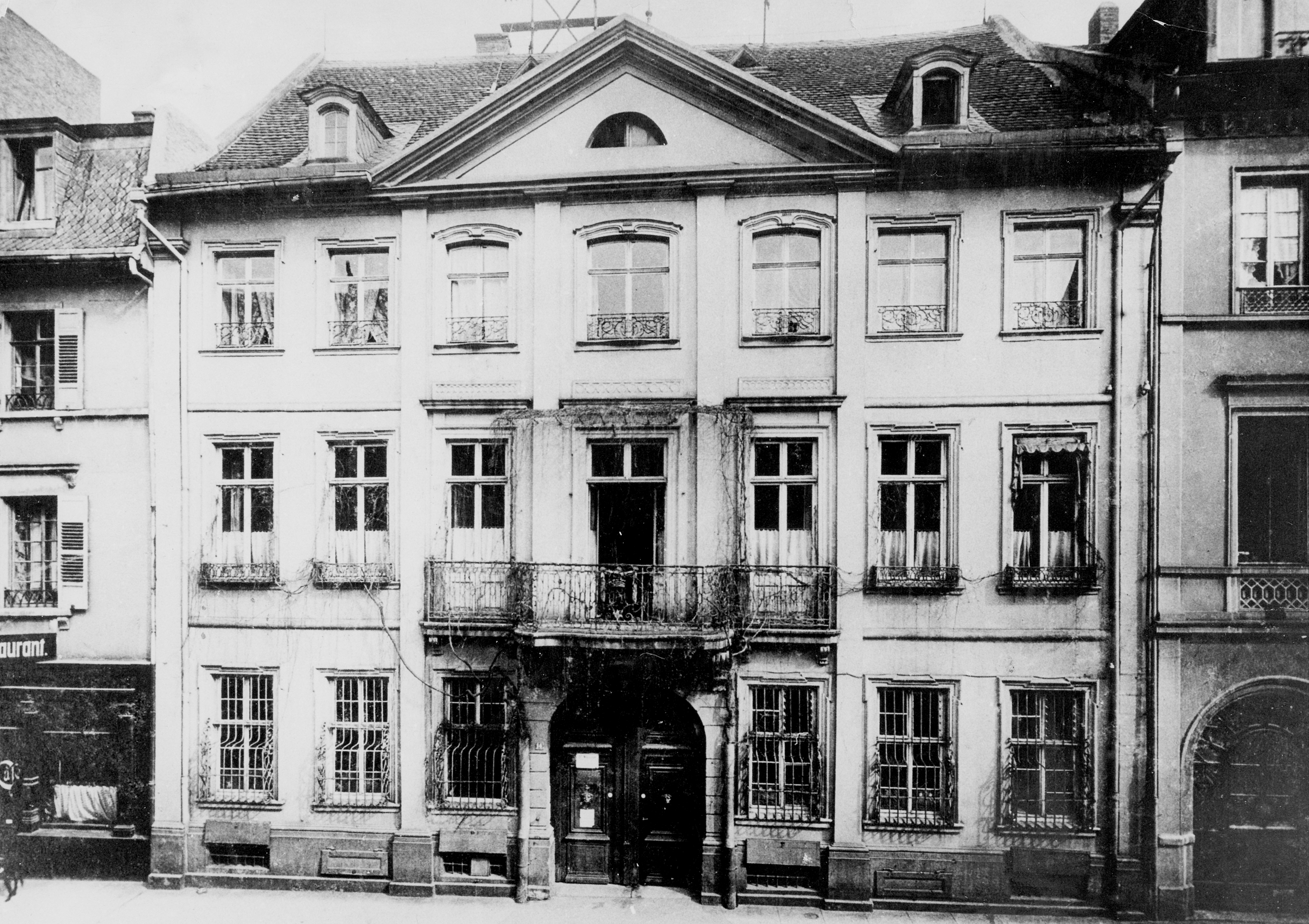 Das „Bankhaus Ladenburg“ in Mannheim (Haus D 3/12, später D3/14) im Jahr 1907